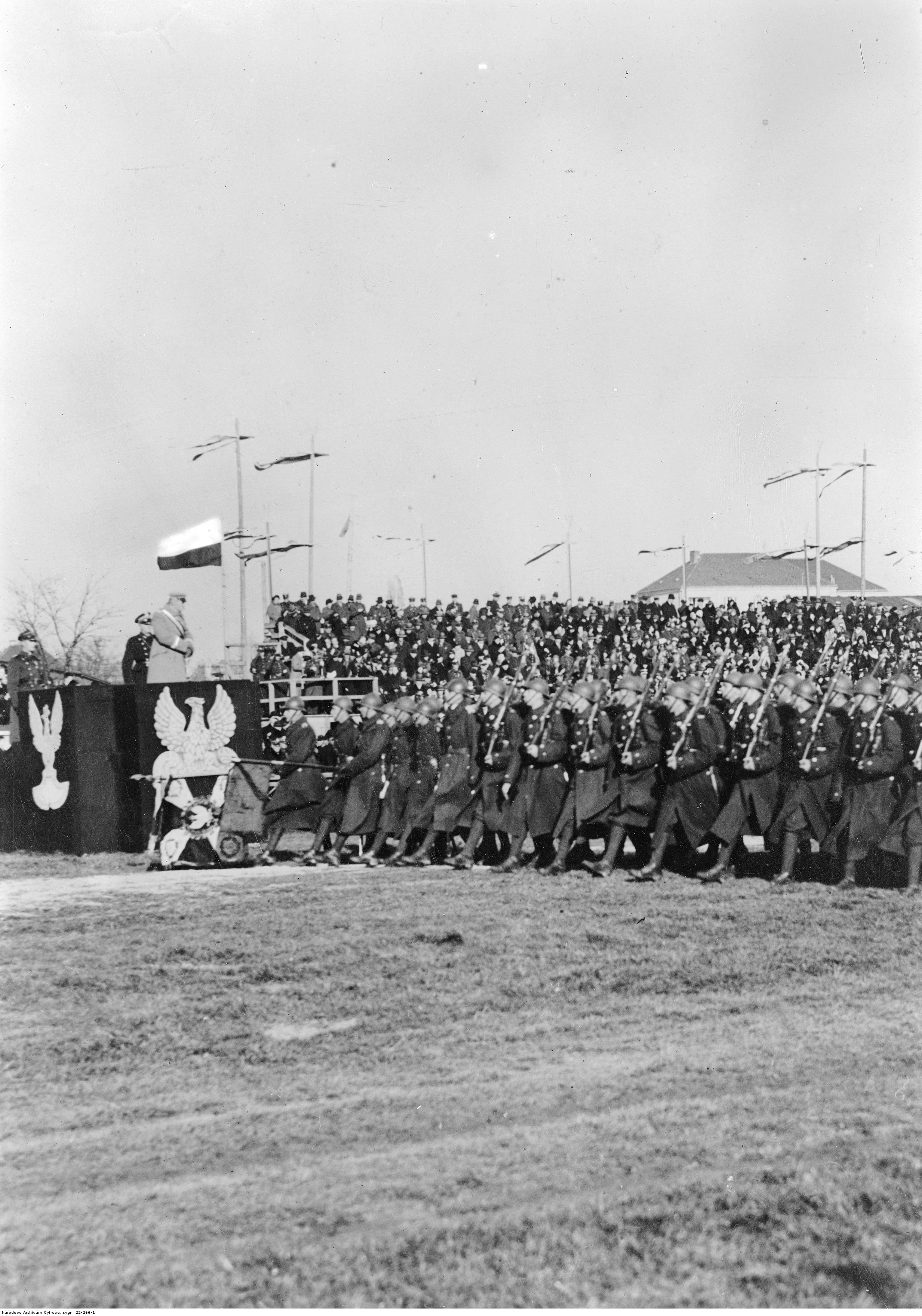 Defilada oddziałów 30 Pułku Piechoty przed marszałkiem Józefem Piłsudskim (na trybunie).